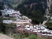 distrito de Parcoy provincia de Pataz